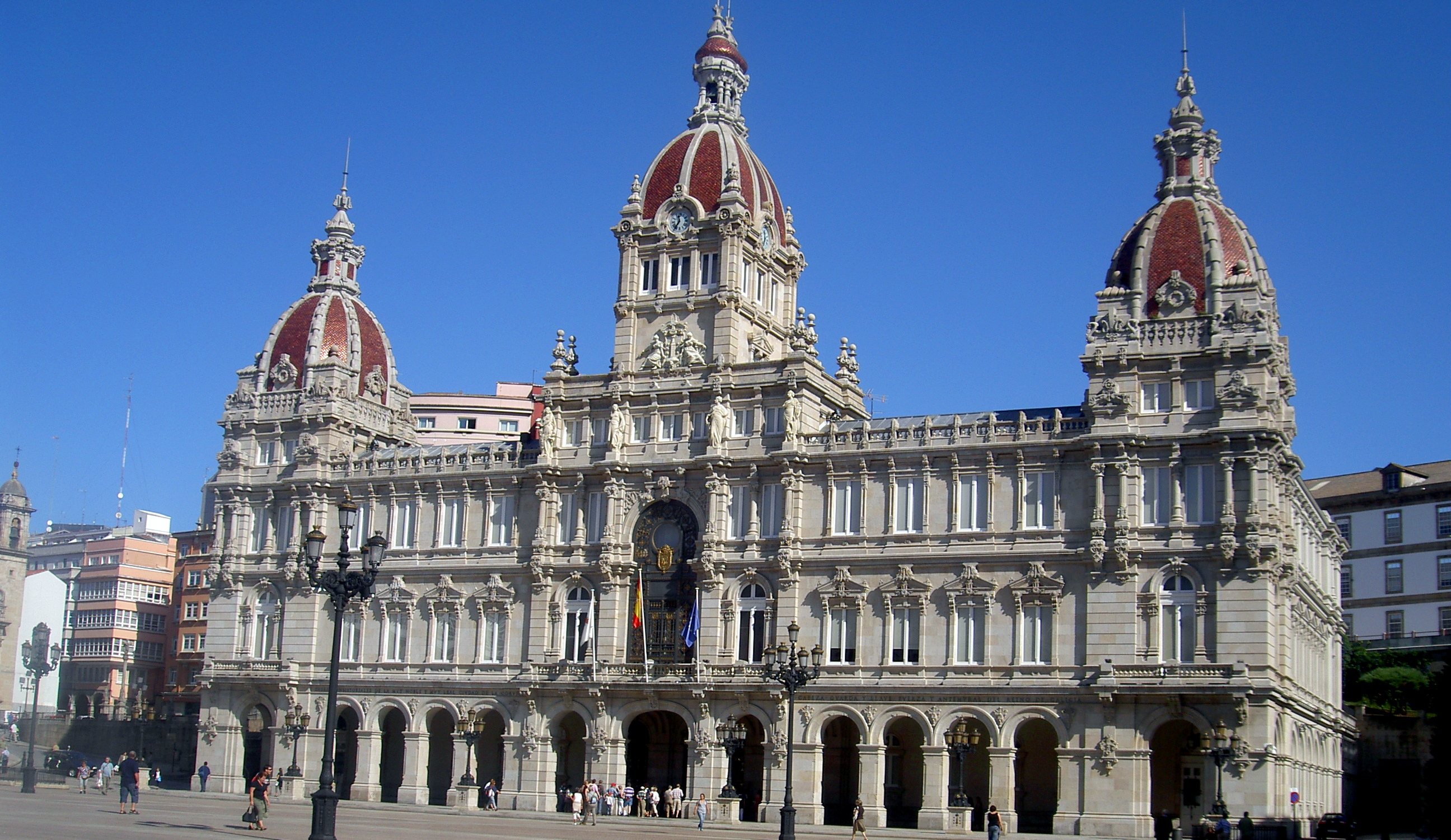 Town hall of A Coruña